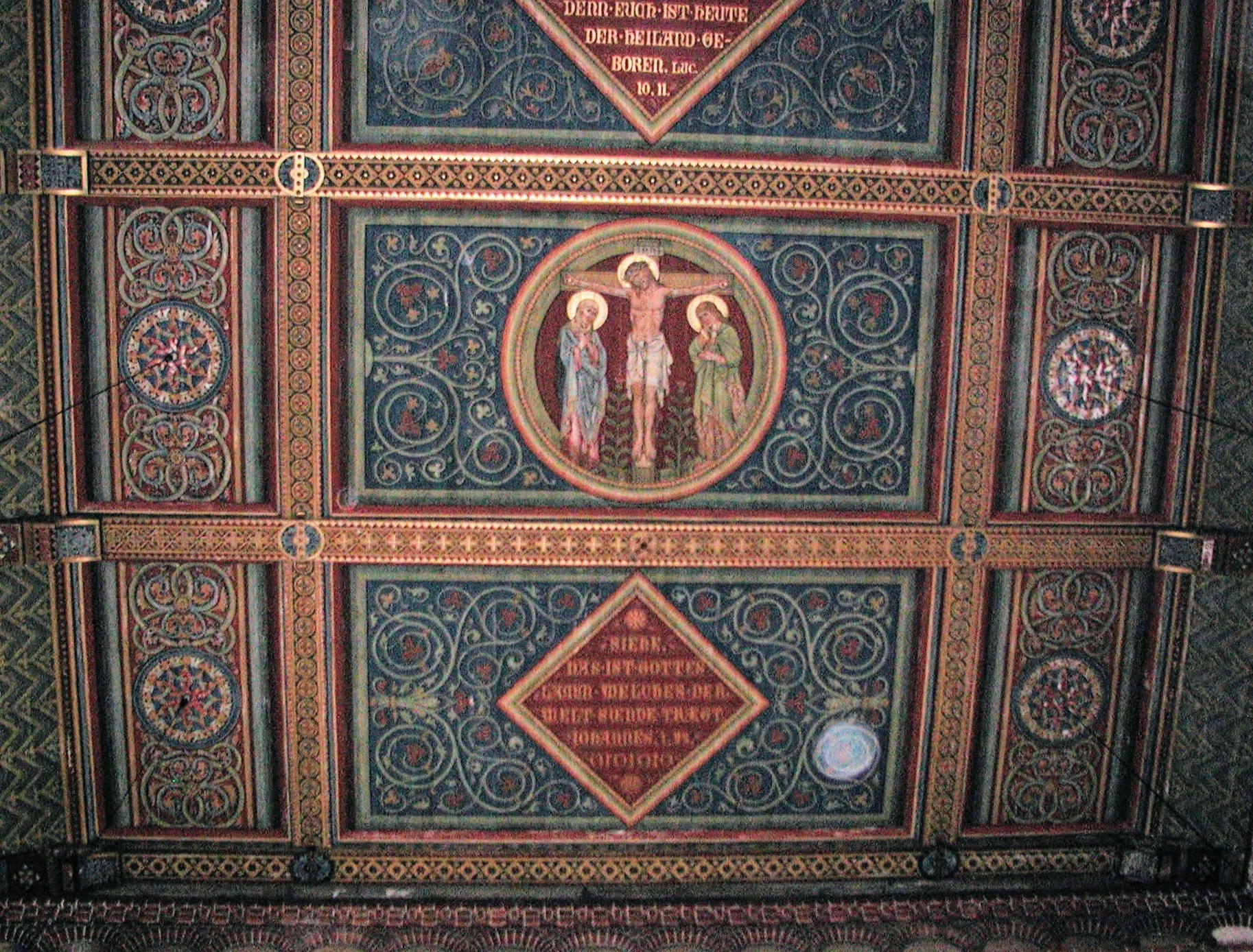 Deckenmedaillon und Flächenornamentik in der Immanuelkirche